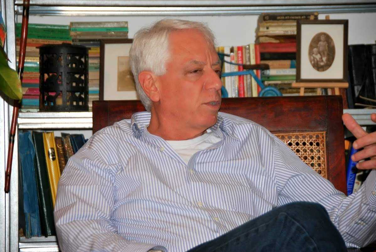 Michael bar-eli